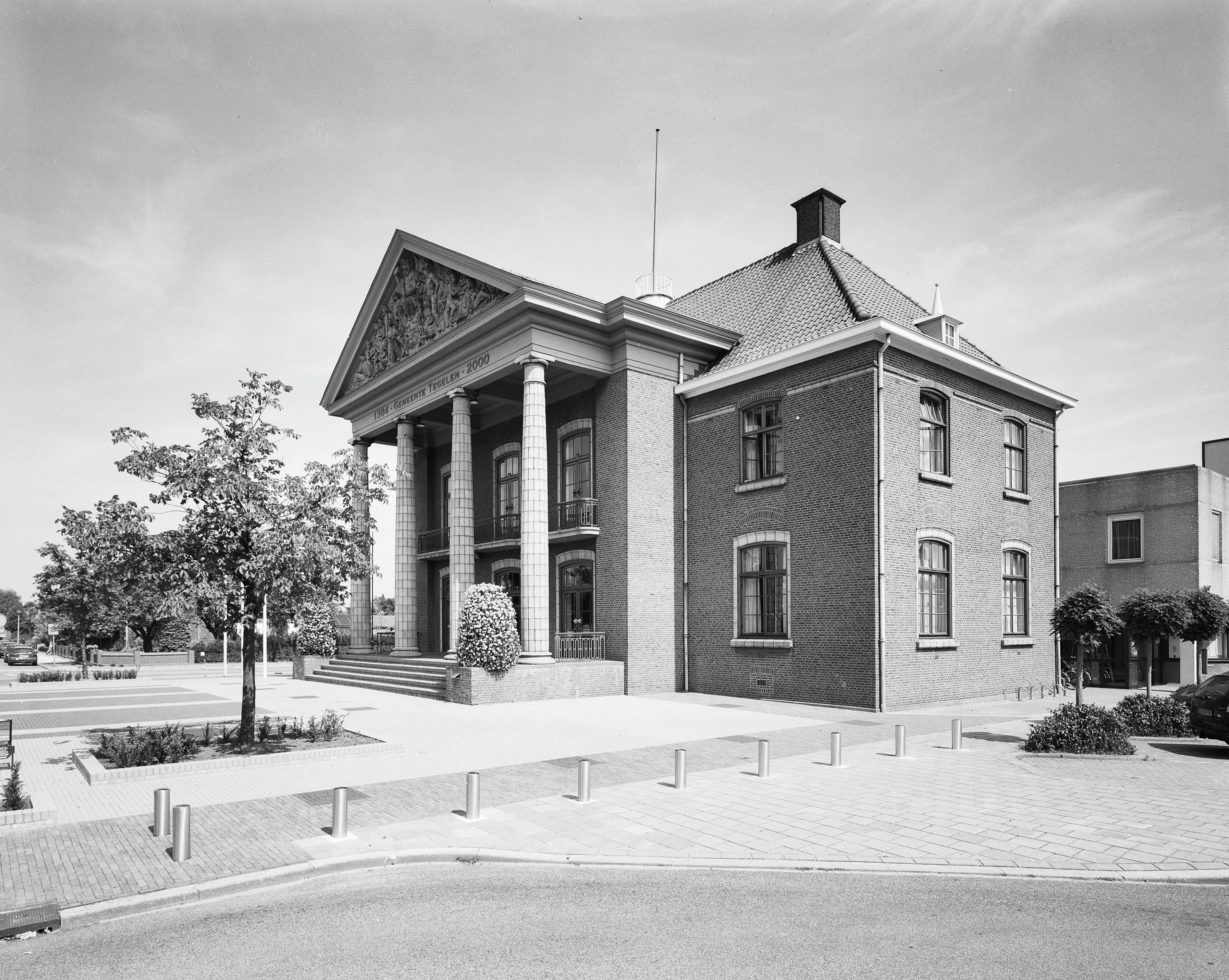 Voormalig Raadhuis: Overzicht voorgevel met zuilen en fronton en rechter zijgevel (opmerking: Gefotografeerd voor Monumenten In Nederland Limburg)